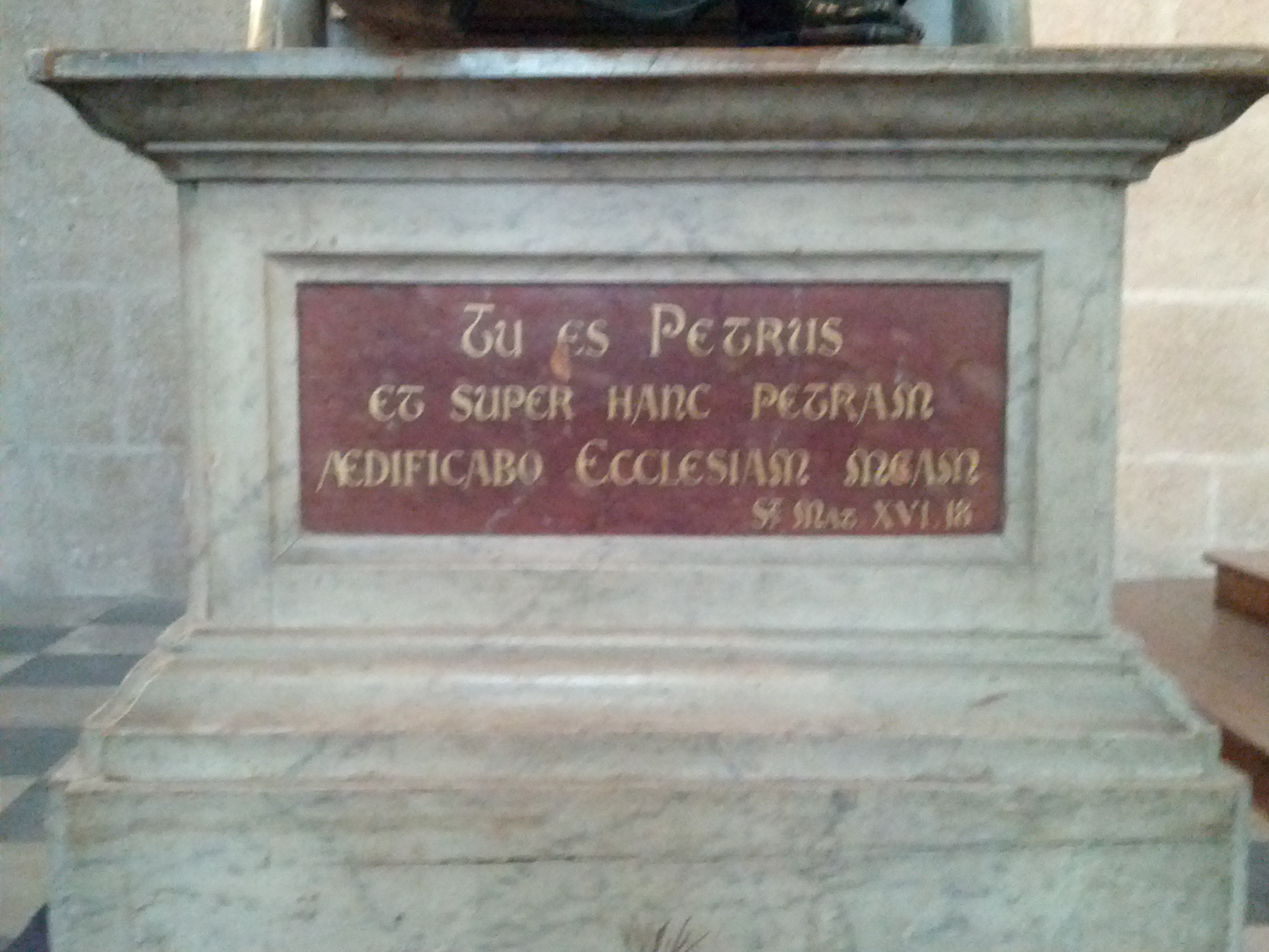 Cathédrale Saint-Pierre-et-Saint-Paul